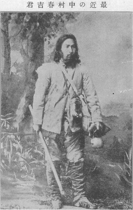 a Japanese adventurer ,中村春吉（Harukichi Nakamura）